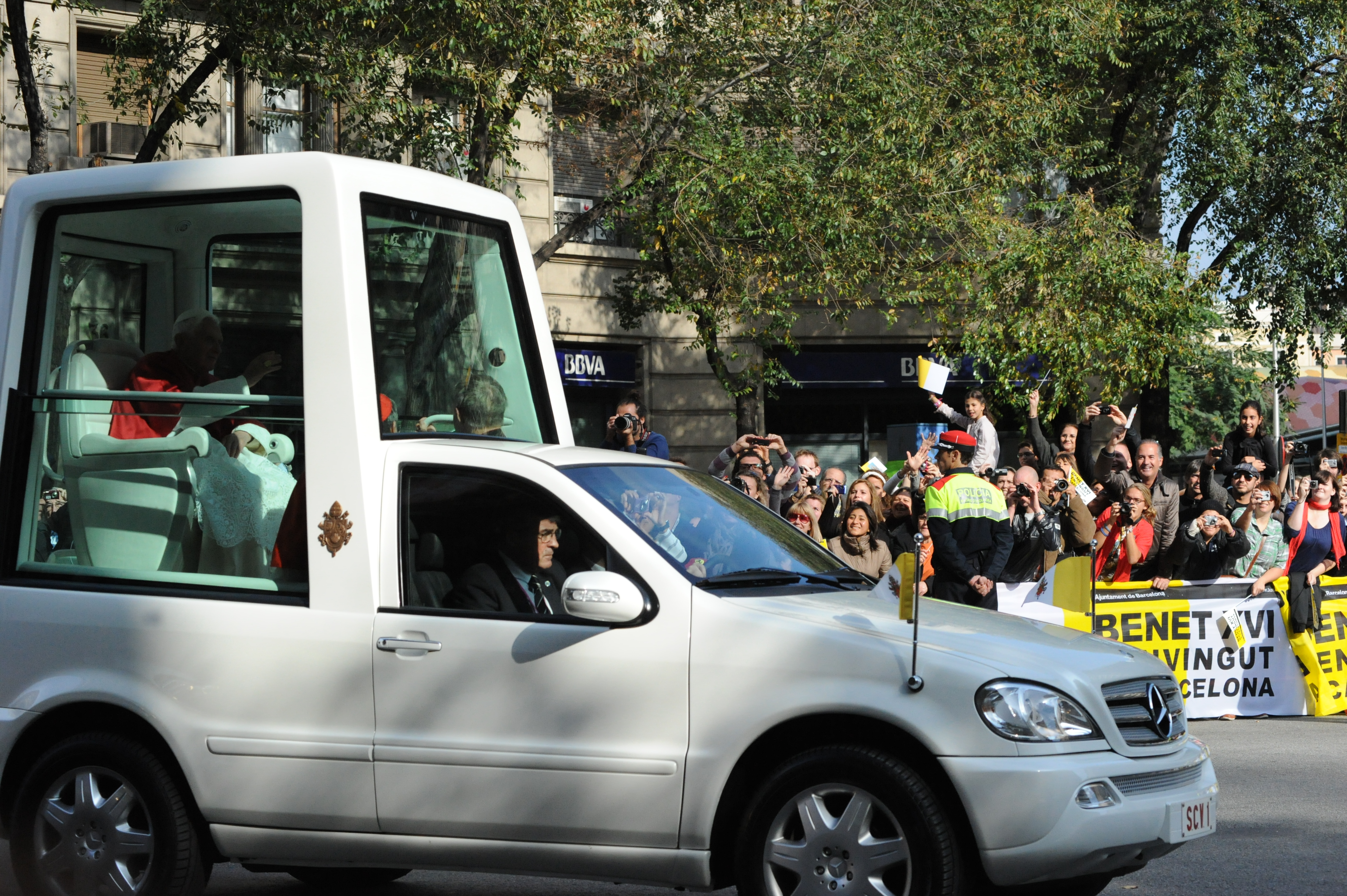 El papamòbil al seu recorregut per Barcelona.